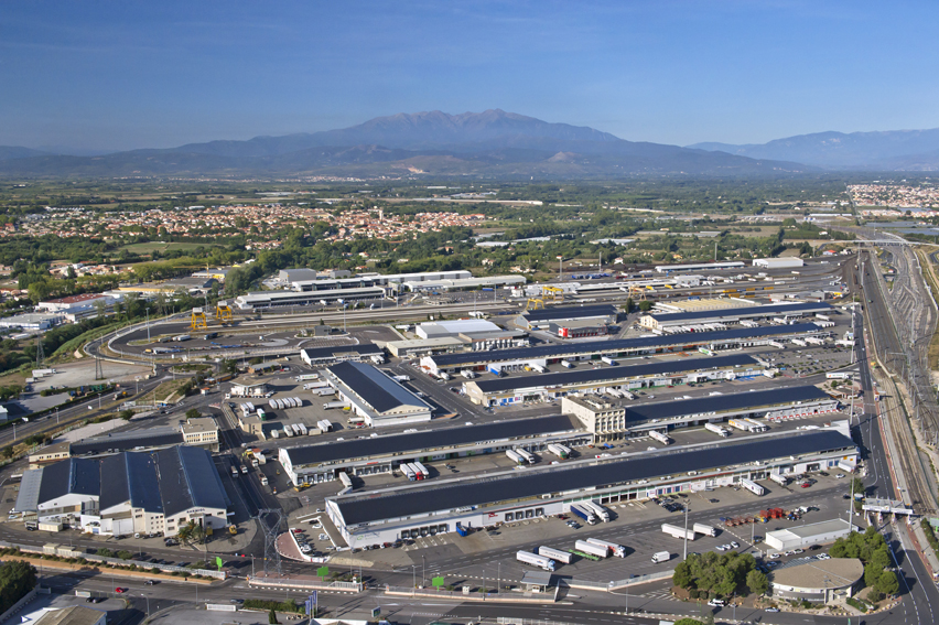 Vue aérienne de Saint Charles International